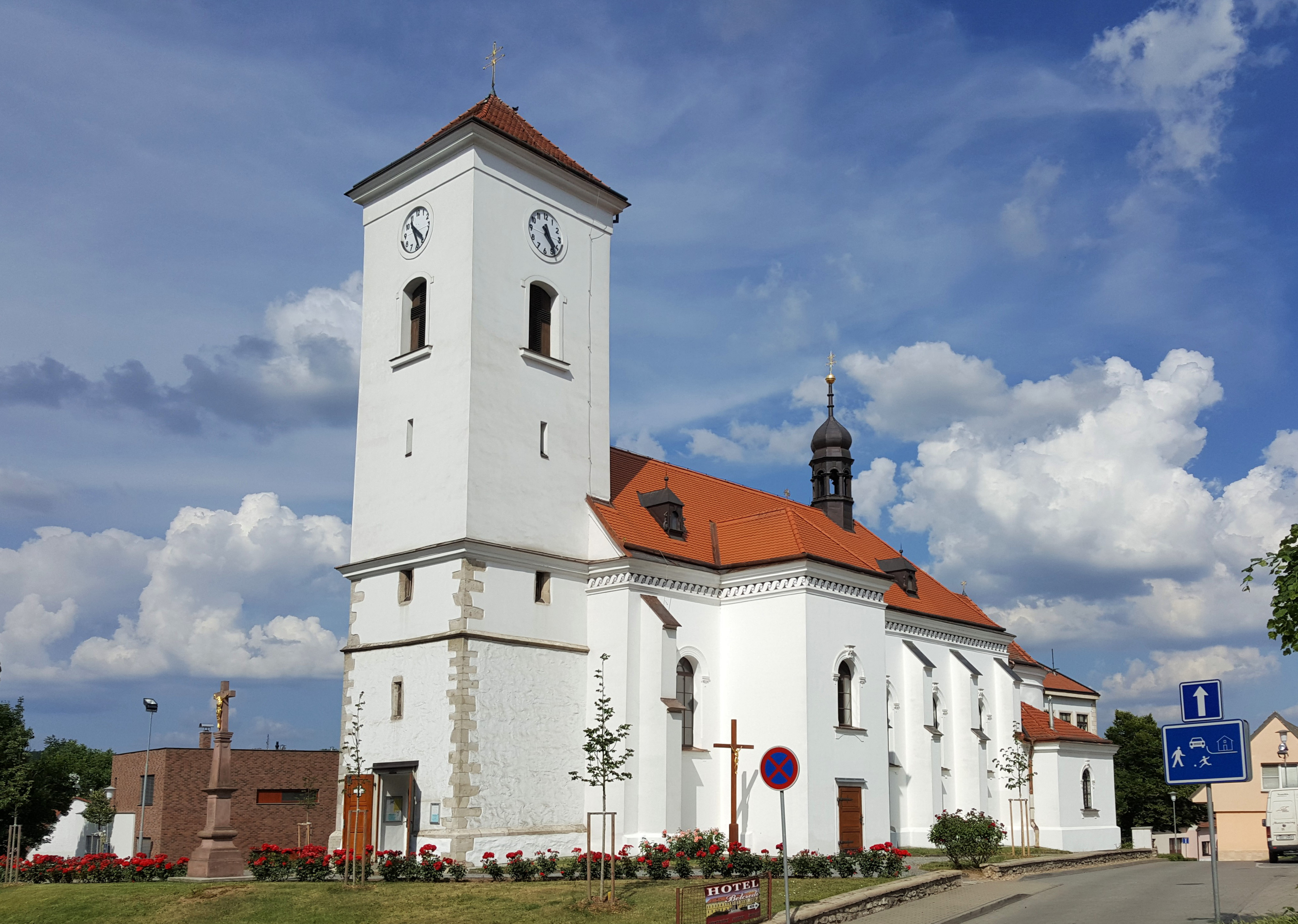 Kostel sv. Jiljí, Brno-Líšeň